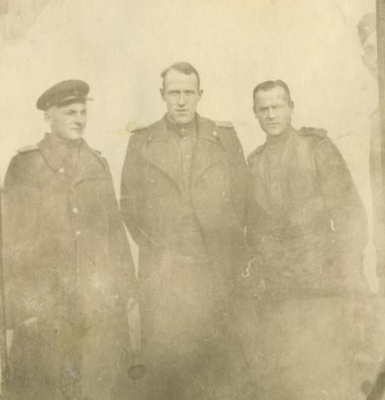 Офицеры 1901 сап. 1944-1945 гг. По центру предположительно командир полка Зирка Трофим Федорович, слева командир взвода боепитания Пастухов И.А.